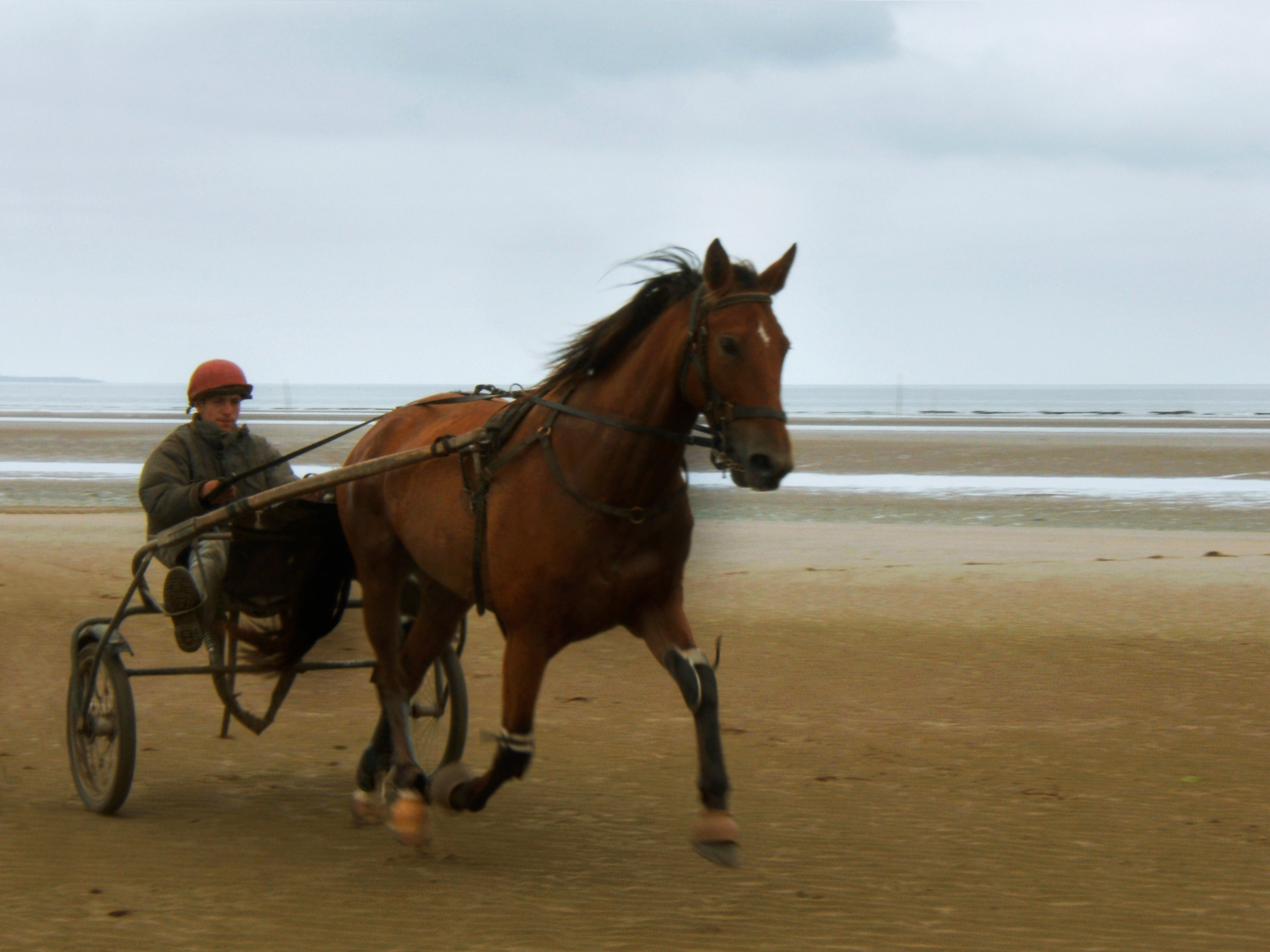 Cheval de courses tractant son entraîneur assis sur son sulky à Utah-Beach, dans le département de la Manche.